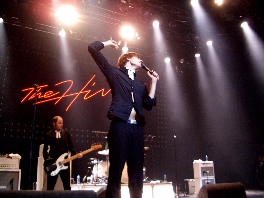 The_Hives